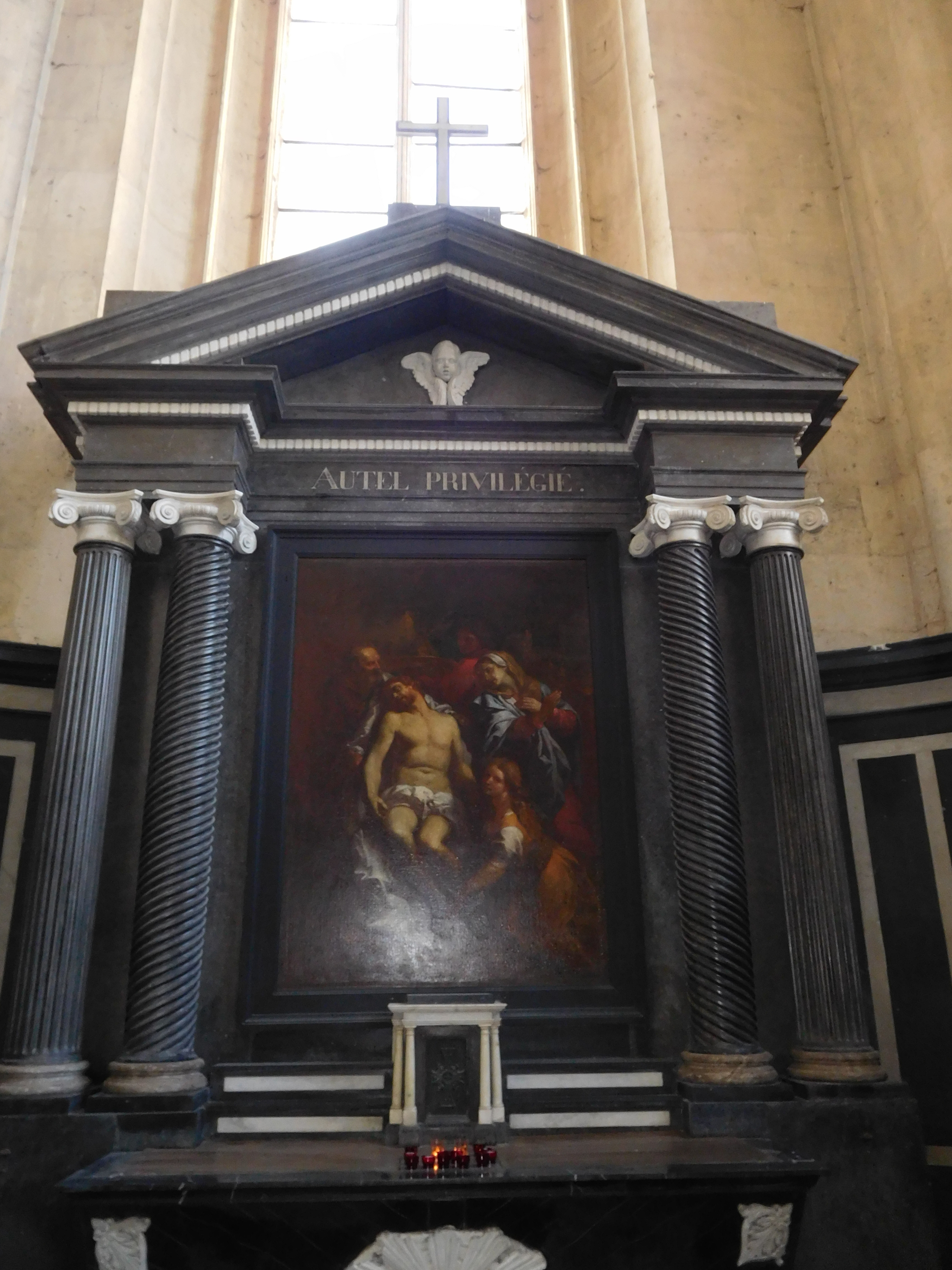 Dans une chapelle latérale de la cathédrale de Beauvais (Oise, France), Descente de Croix par Charles de La Fosse.